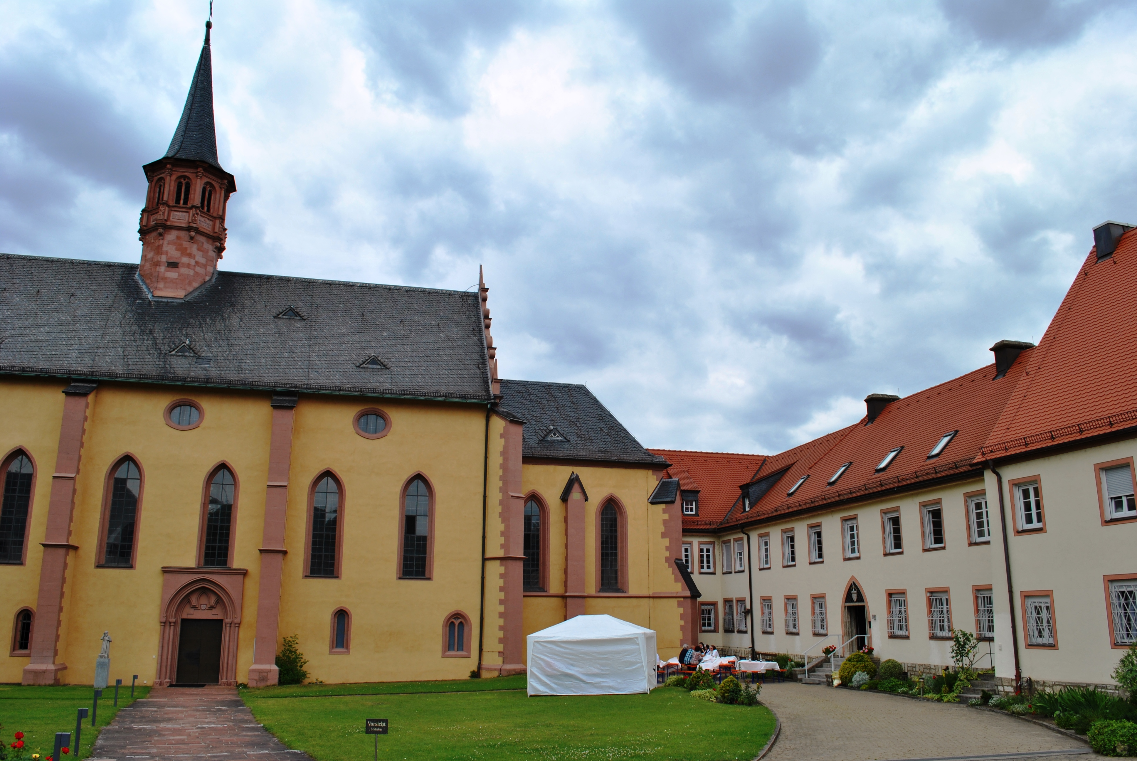 Klosterkirche Himmelspforten, Konventsgebäude